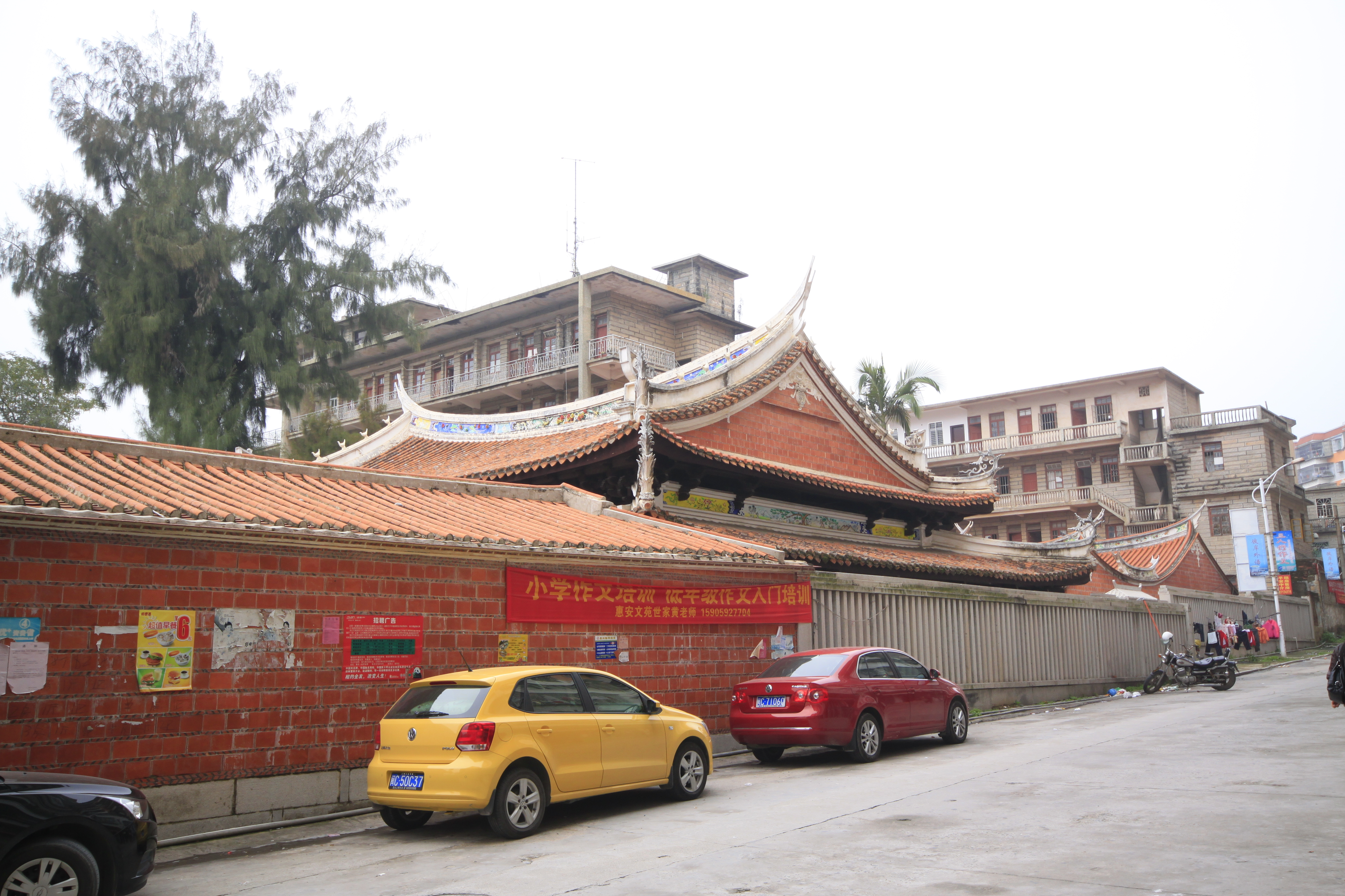 惠安孔庙，位于中国福建省惠安县，是福建省文物保护单位。